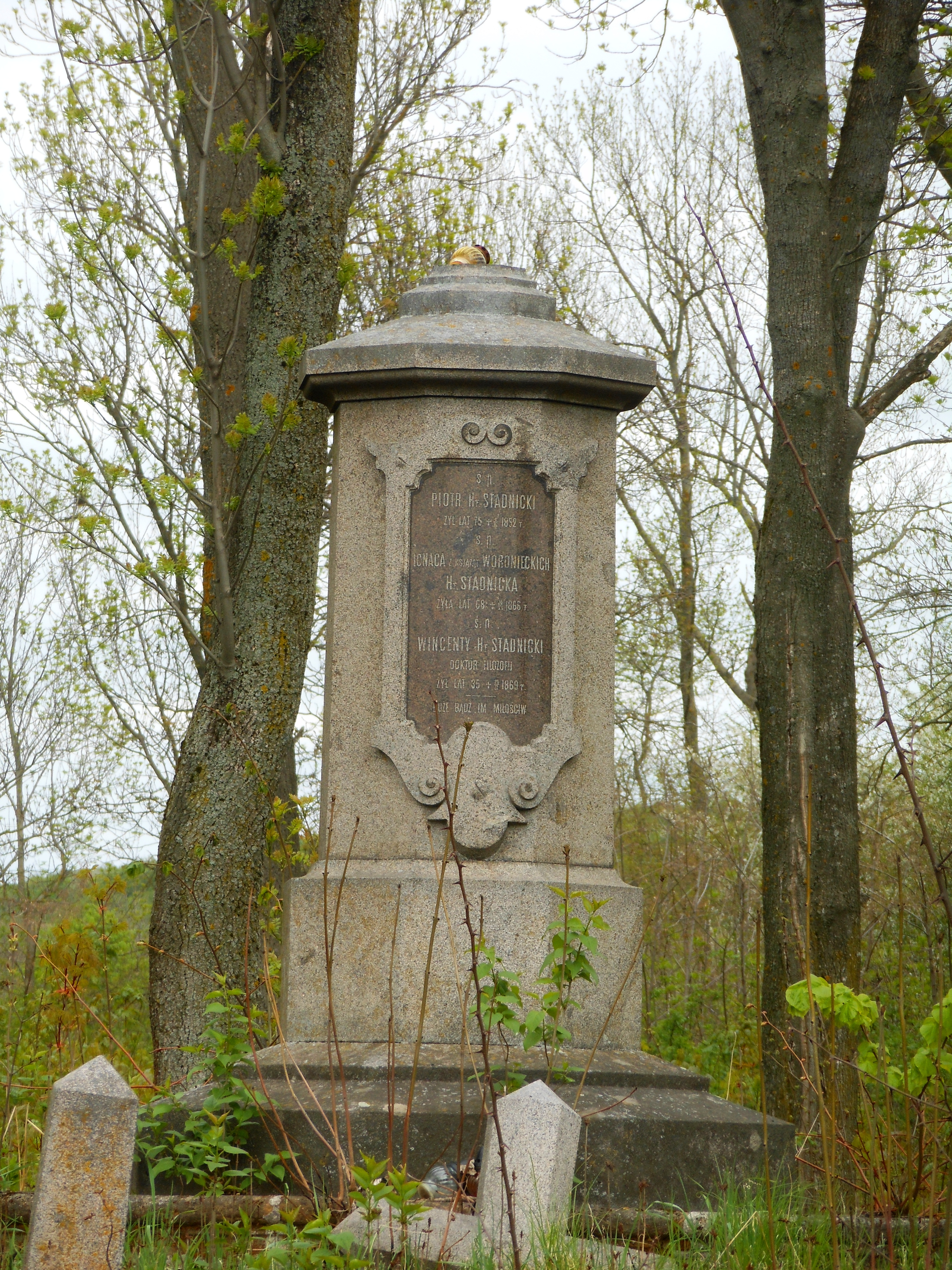 Памятник на могилі Вінсентія Стадніцького та його батьків на католицькому кладовищі в Сніткові